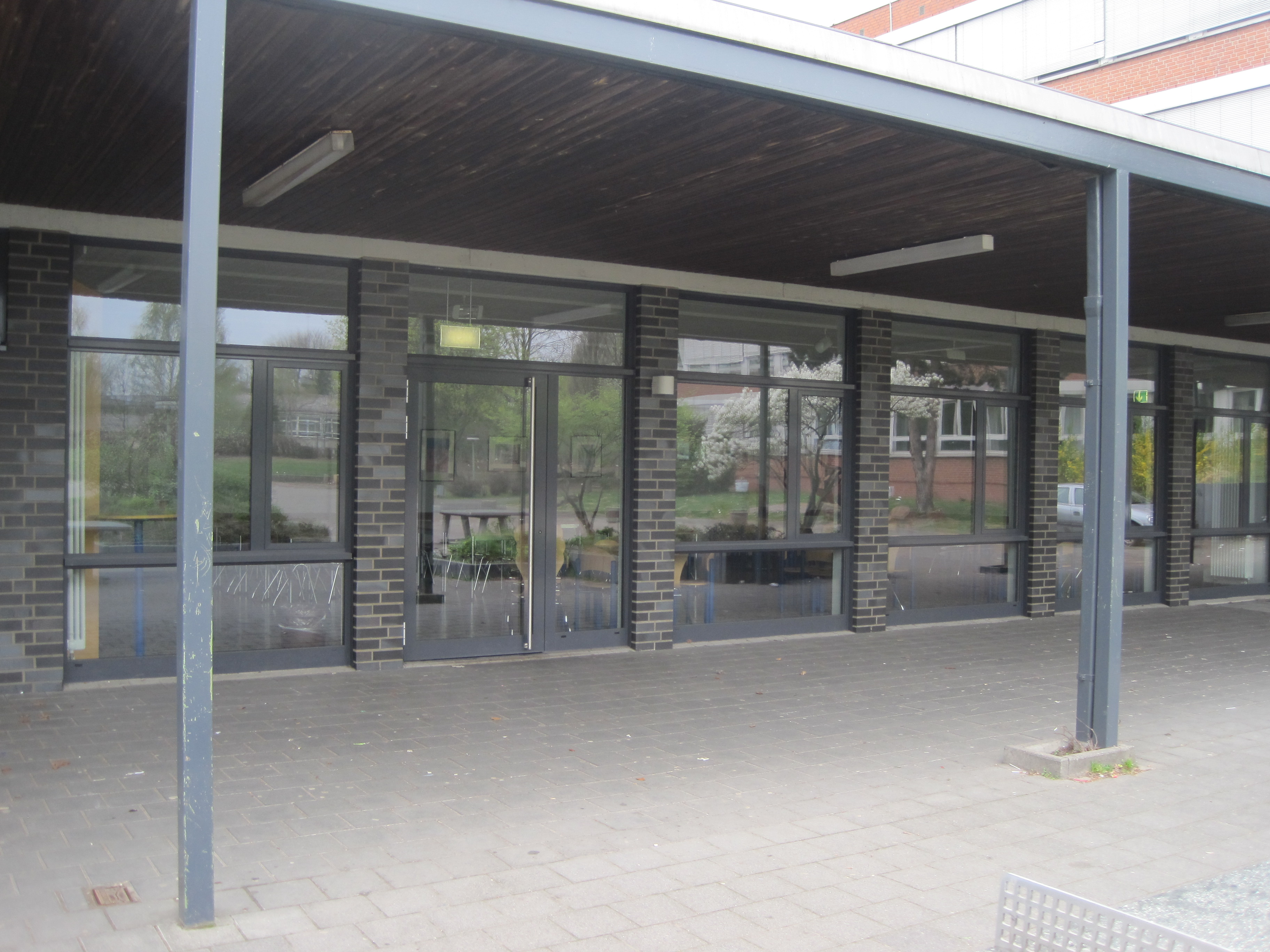 Das Foto zeigt die Caféteria des Galilei-Gymnasiums Hamm.